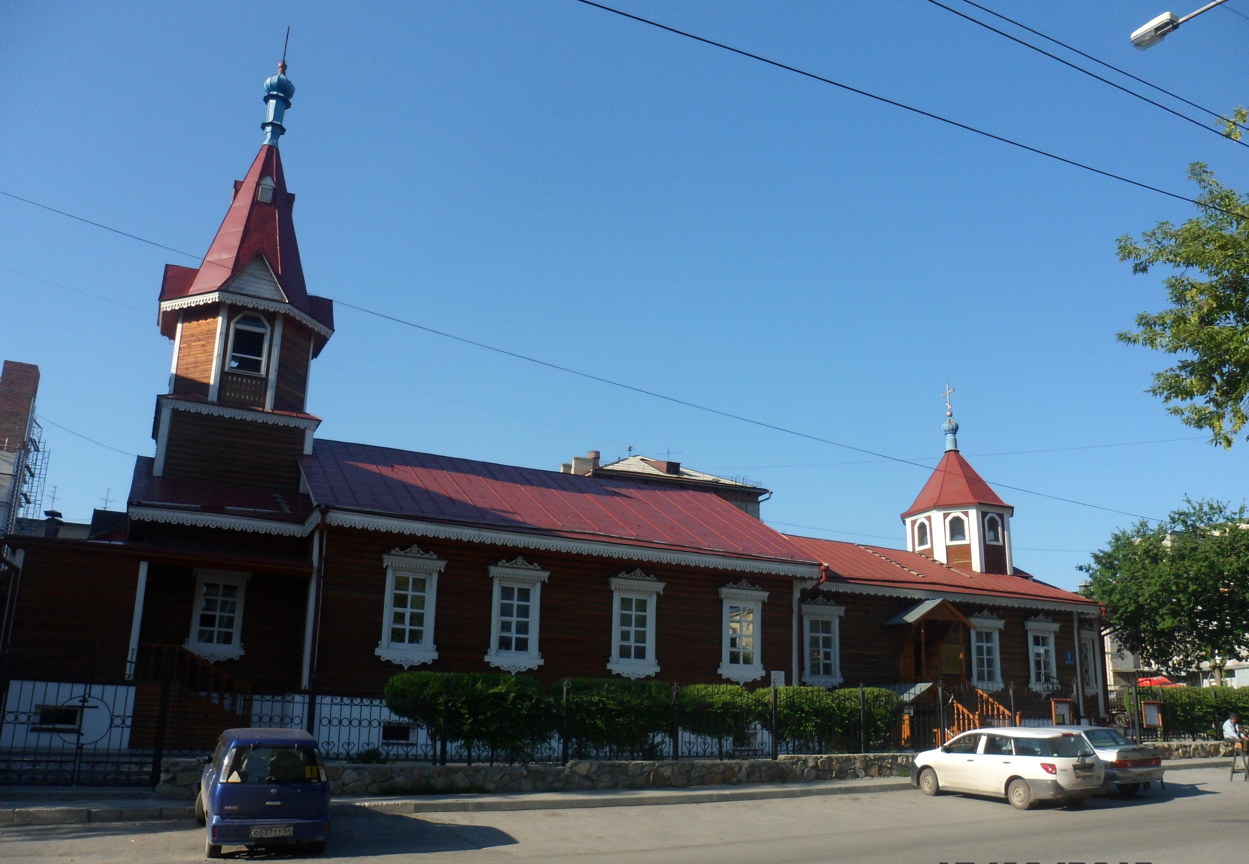 Церковь построена в 1906 году на средства купцов Маштаковых. Чудом уцелела после пожара 1909г. в Новониколаевске. В 30-х годах, церковь была закрыта(Новосибирская область, Новосибирск, Октябрьская, 9)